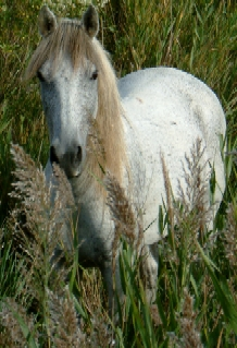 Camargue-Pferd aufgenommen in der Camargue ca. 5 km landeinwärts von Saintes-Maries-de-la-Mer.